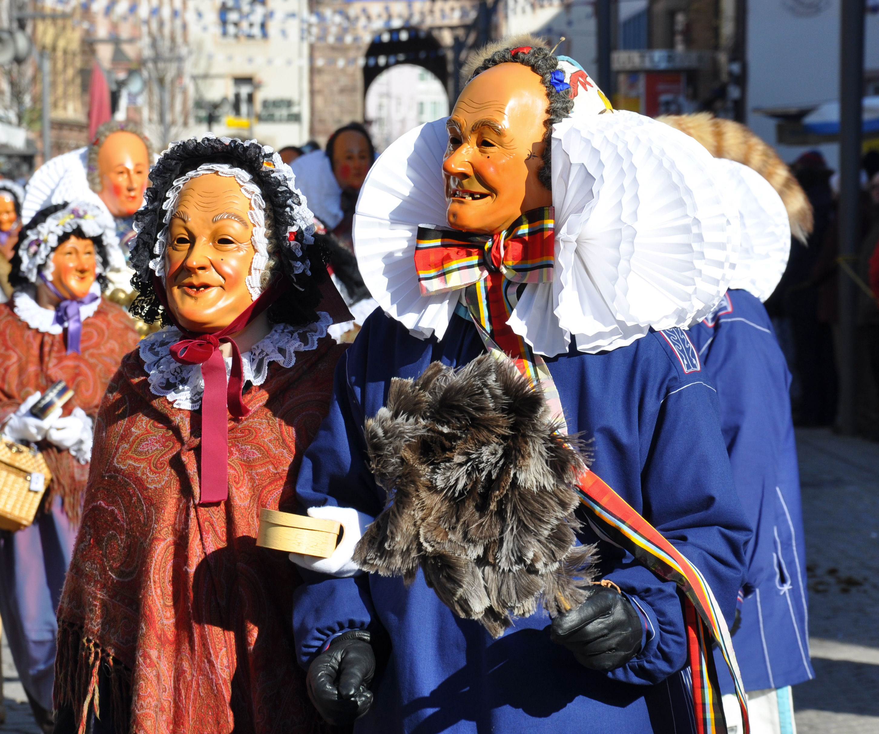 Historischer Umzug der Narrozunft Villingen, Fasnetsmontag 2011 Morbili und Stachi (mit Surhebel-Scheme)